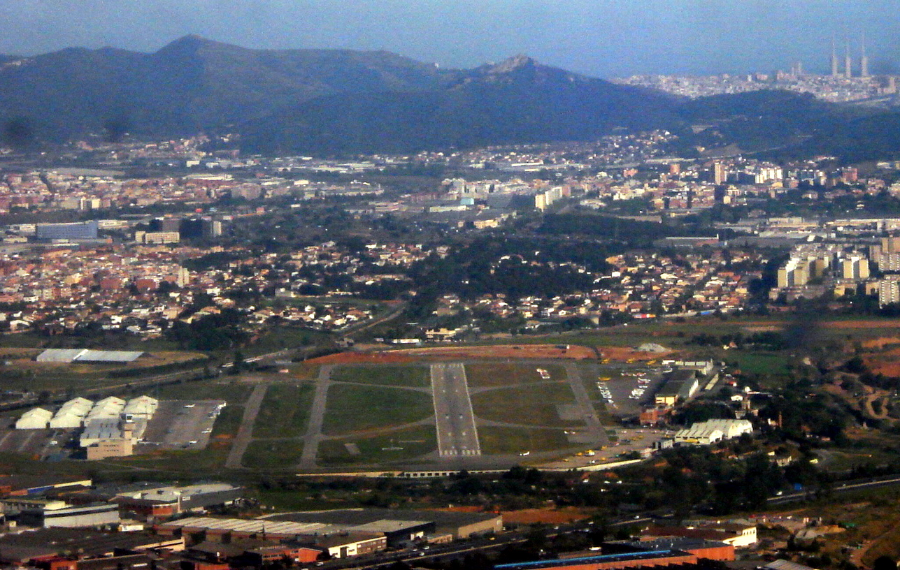 Vista des del cel de la pista de l'aeroport de Sabadell